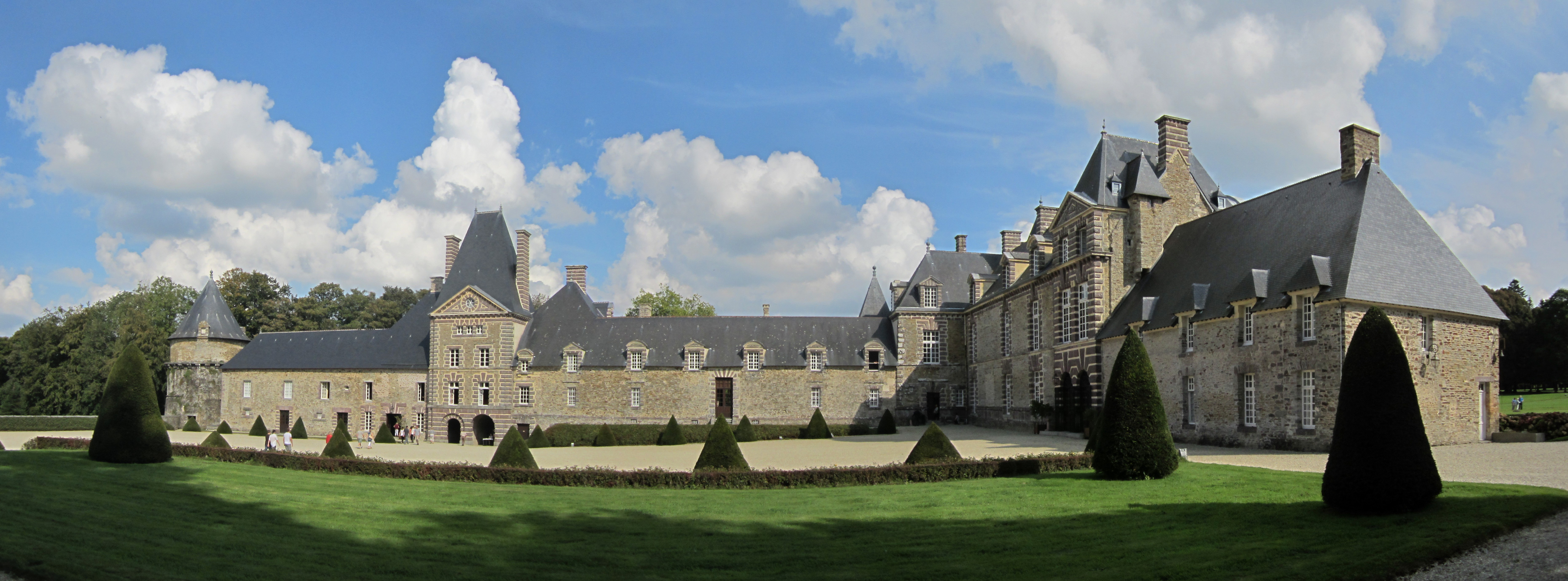 Château de Canisy, Manche Journée du patrimoine 2014 - Chateau&Parc .